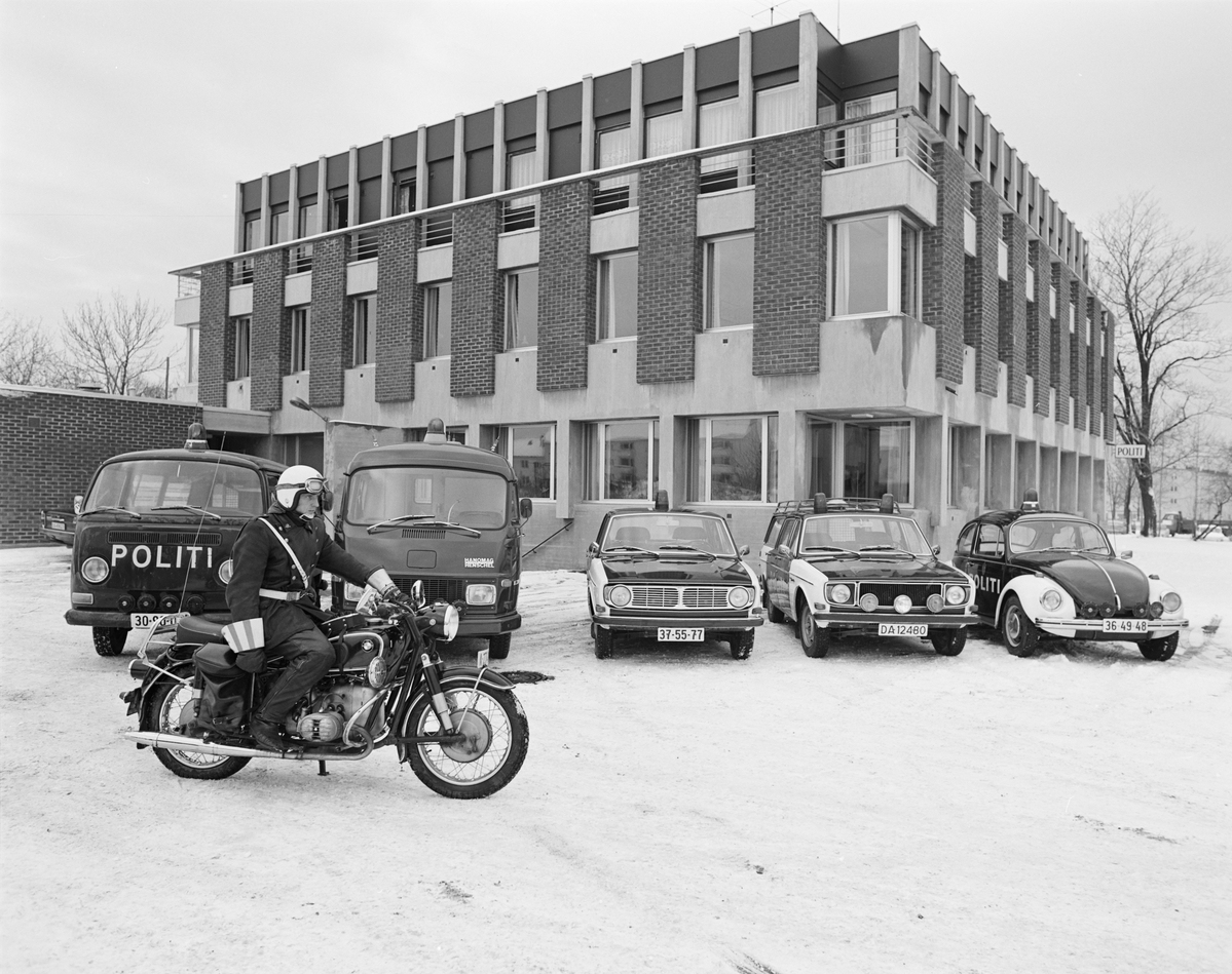 Manglerud politistasjon oktober 1972